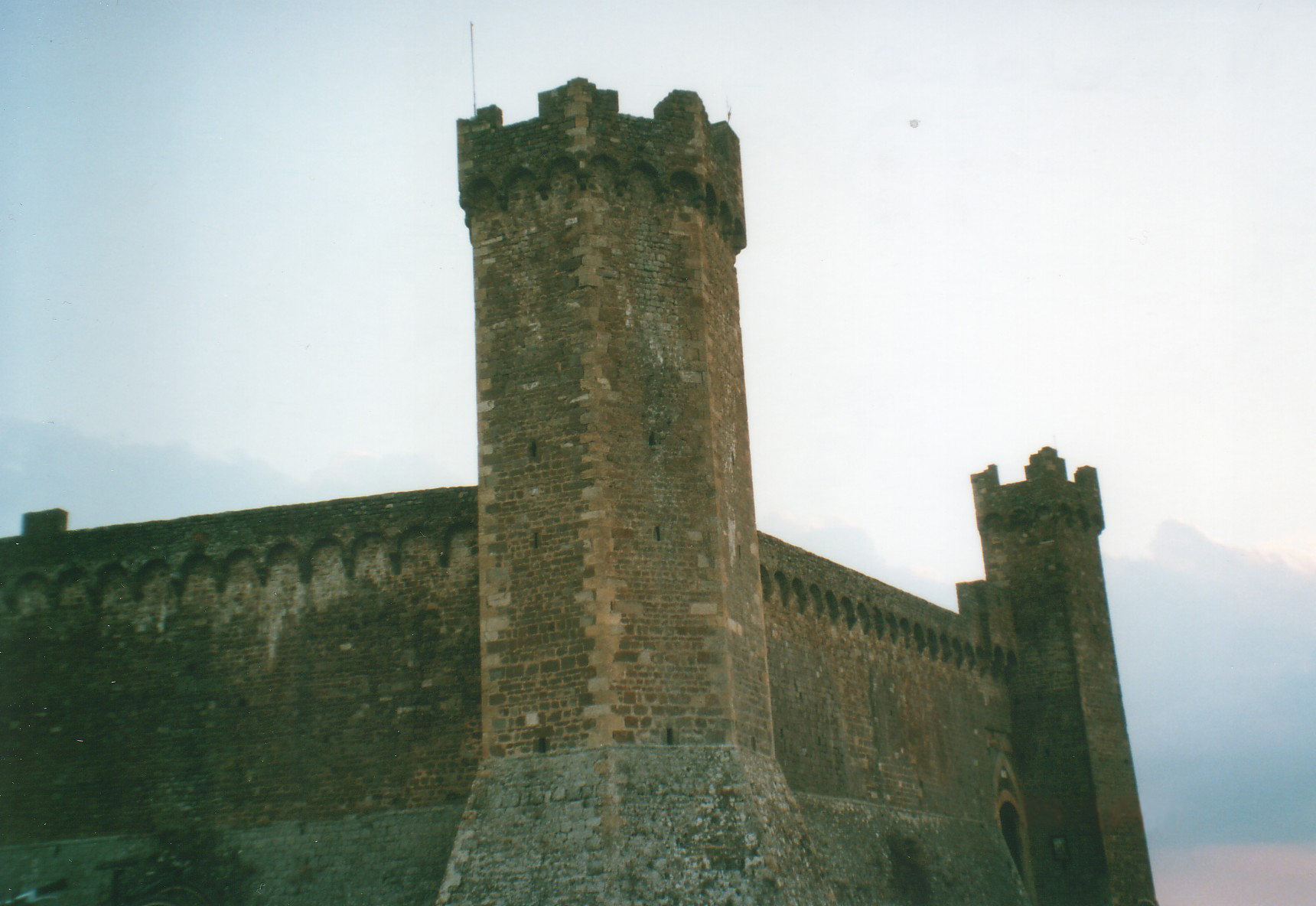 Author Giorces. Montalcino - Castello.